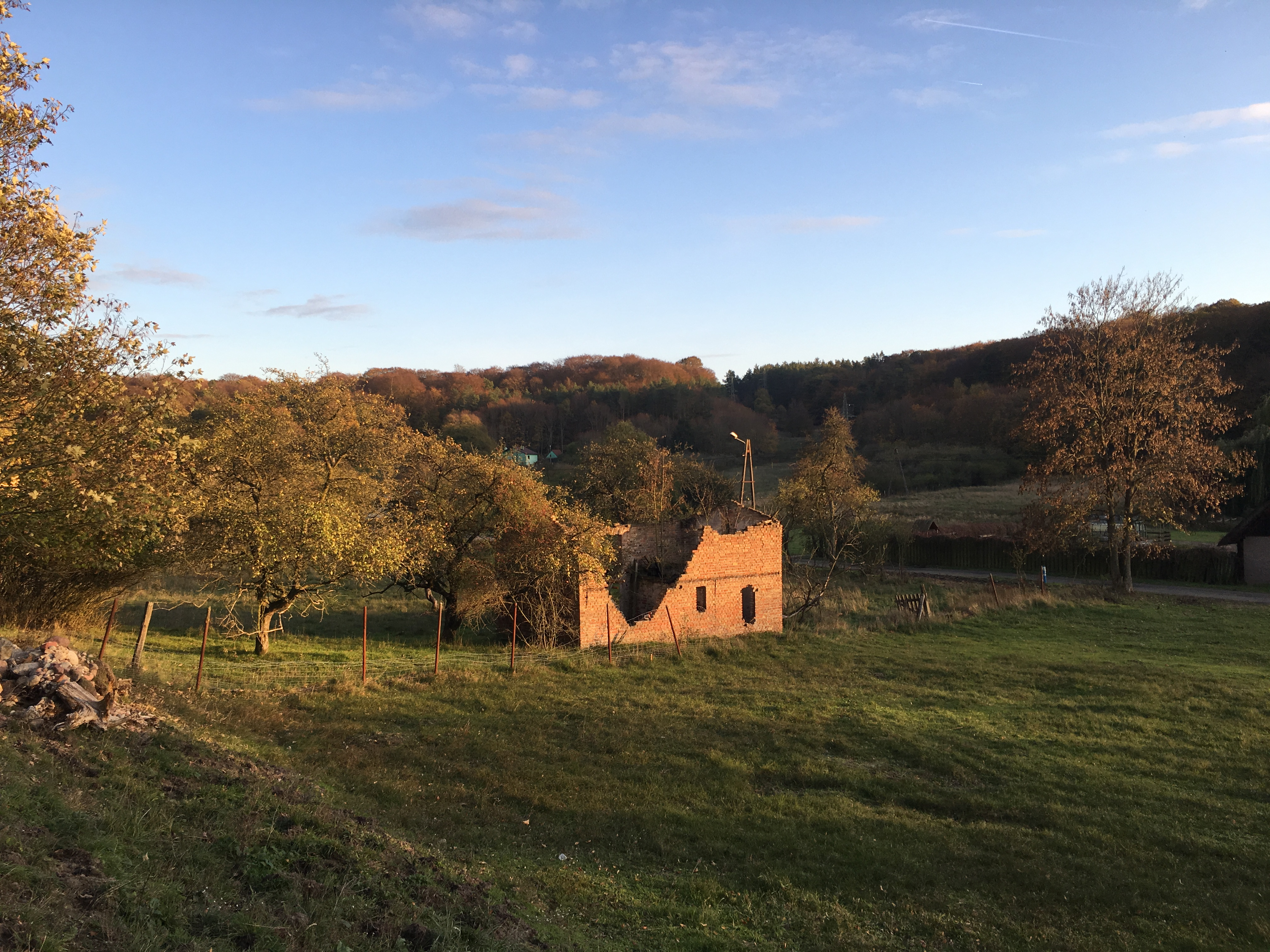 An der ul. Okragla zwischen den Waldsiedlungen Kępa und Trzciągowo (Stengow) gelegenes und verfallendes Gebäude mit Blick in Richtung Süd- Ost.